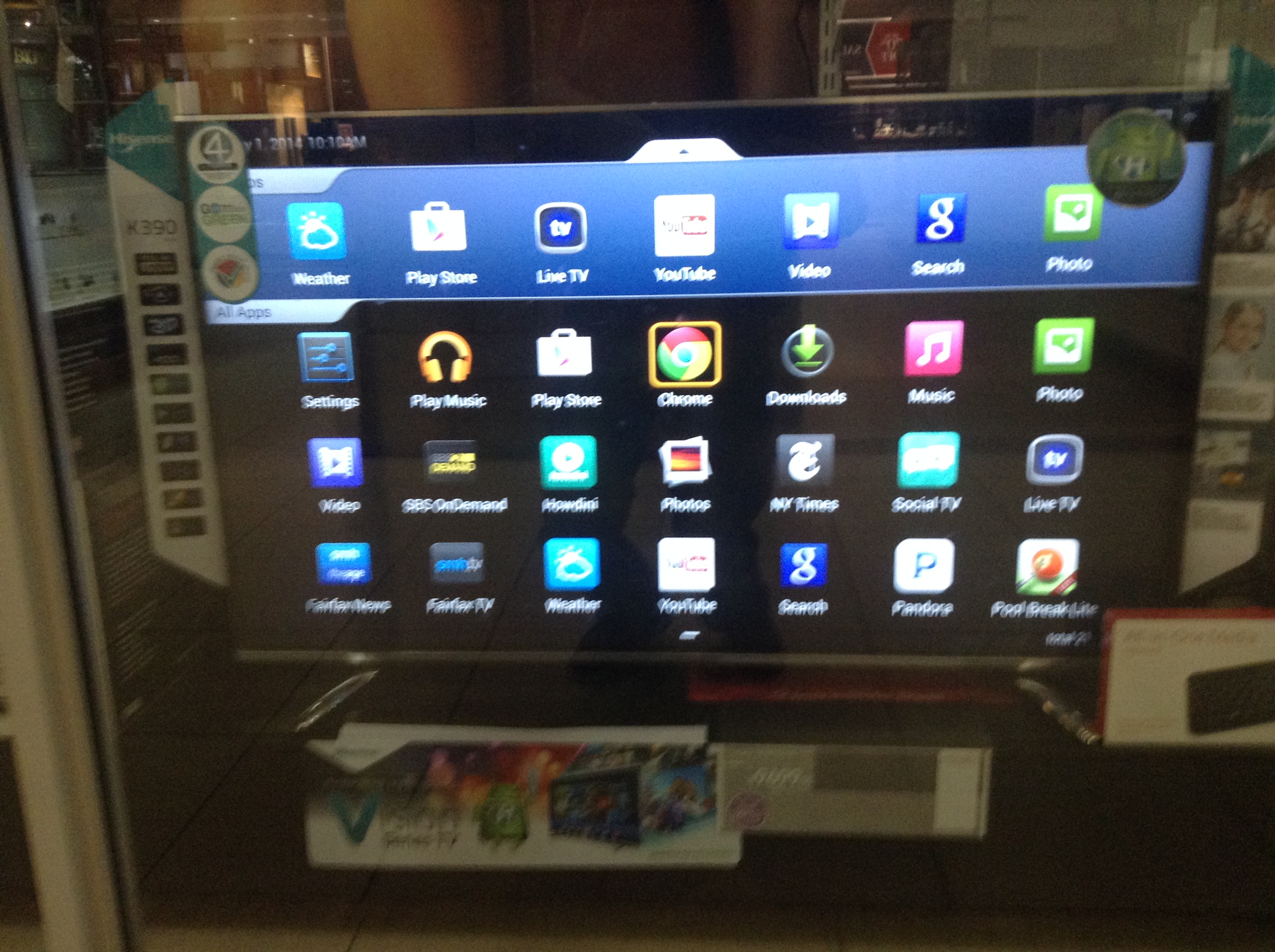 Smart TV